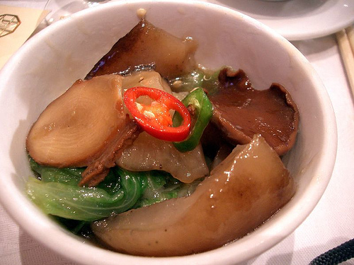 Sea cucumber hoi sum